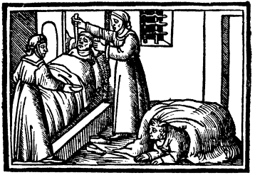 Socrate soigné par deux femmes. Méroé et sa soeur poignardent Socrate pendant qu'Aristomène se cache sous un drap.